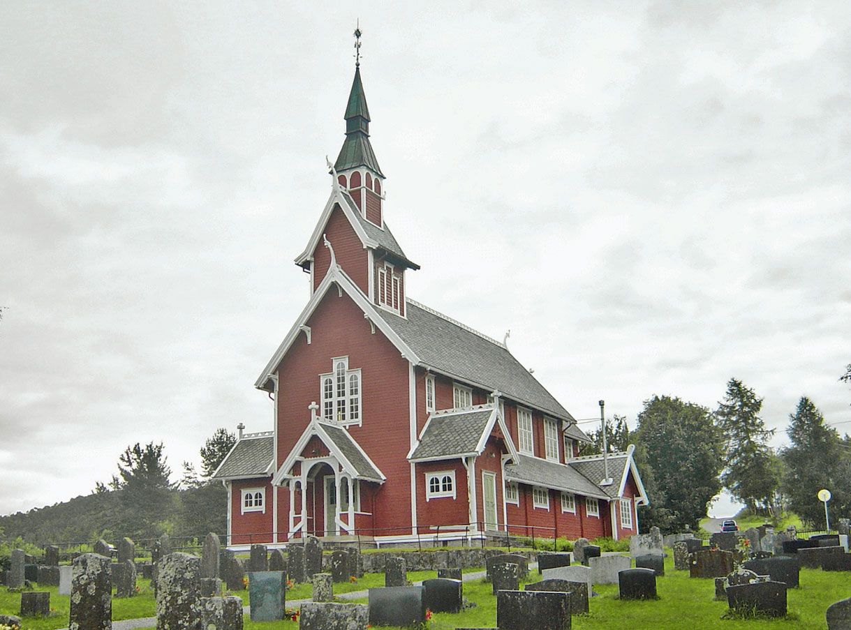 Veøy church, Molde, in Norway